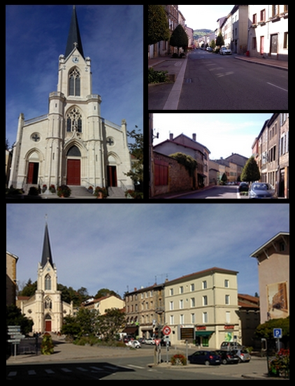 Pontcharra sur Turdine (Rhône)